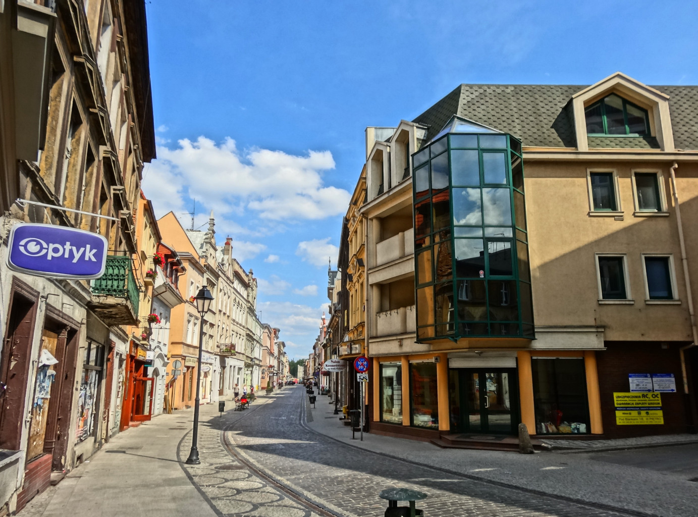 Ulica Długa na Starym Mieście w Bydgoszczy